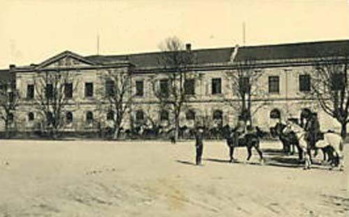 k.u.k. Dragoner-Kaserne in Wels